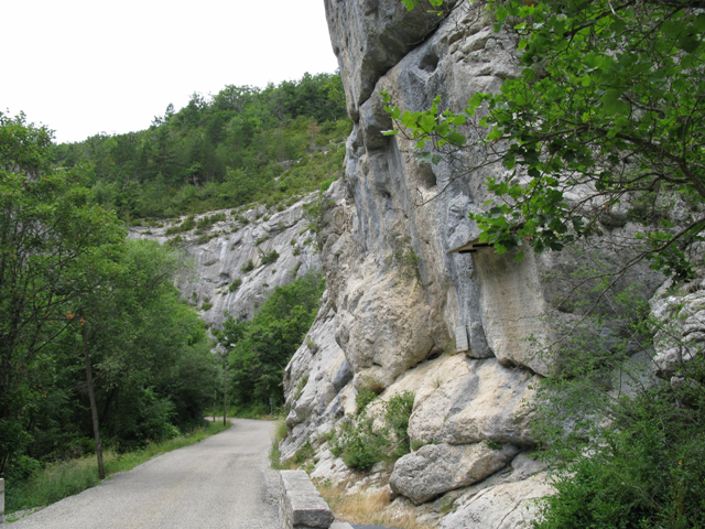 Localisation de la dédicace de Dardanus sur la route de Sisteron à Saint-Geniez (France, Département des Alpes de Haute-Provence).